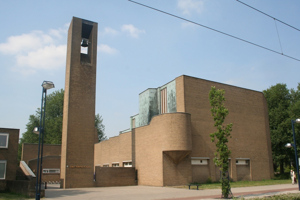 De Opgang (Osdorp), 1967; architecten G. de Klerk en J. Kruger; gesloopt in 2007; nieuwbouw door KCAP-architecten in 2009. Foto: Erik Swierstra.